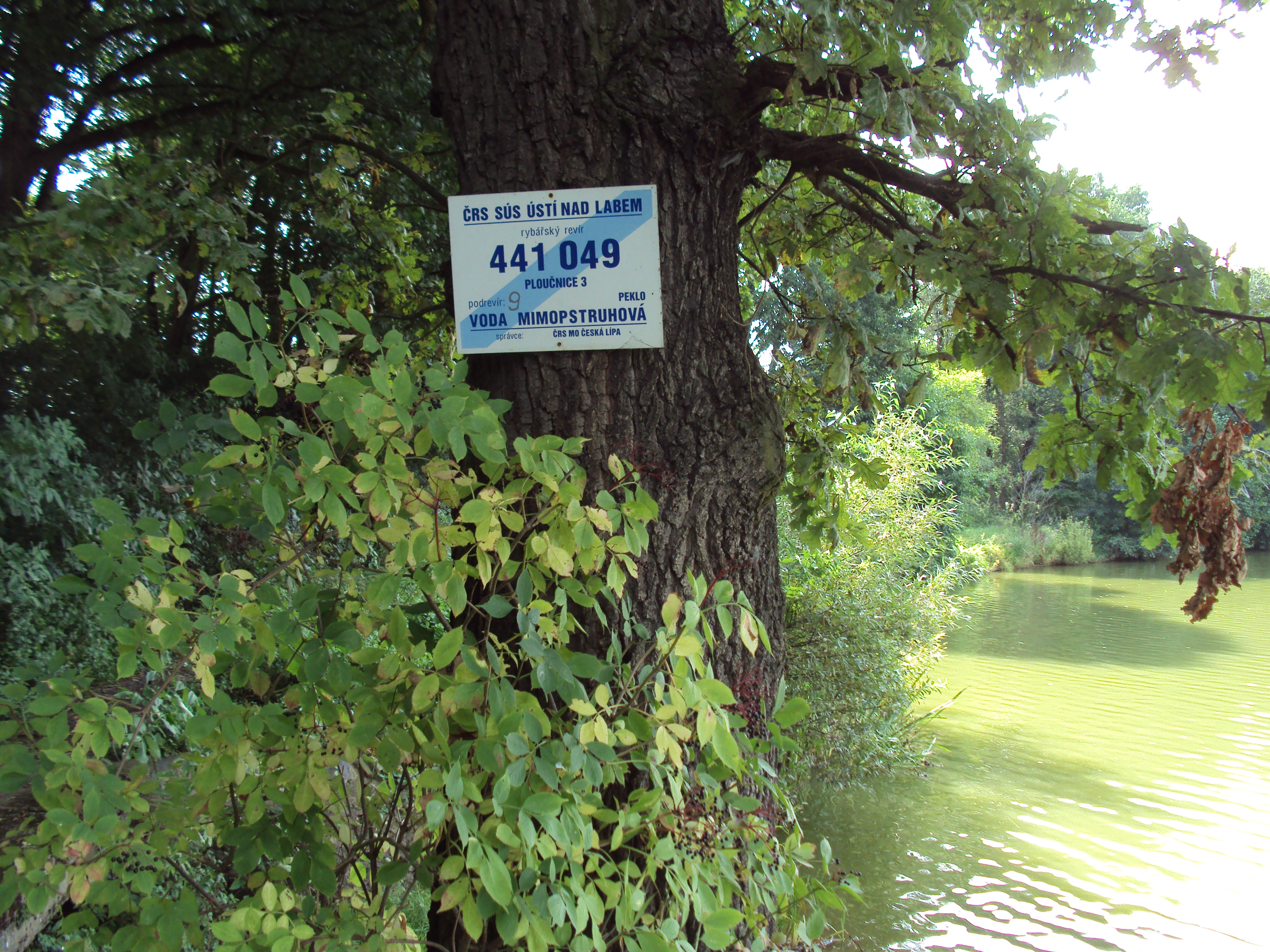 Rybářský revír na rybníku Dolní Roubice (Peklo III) u čtvrti Dubice, Česká Lípa